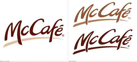 Variação nos logos